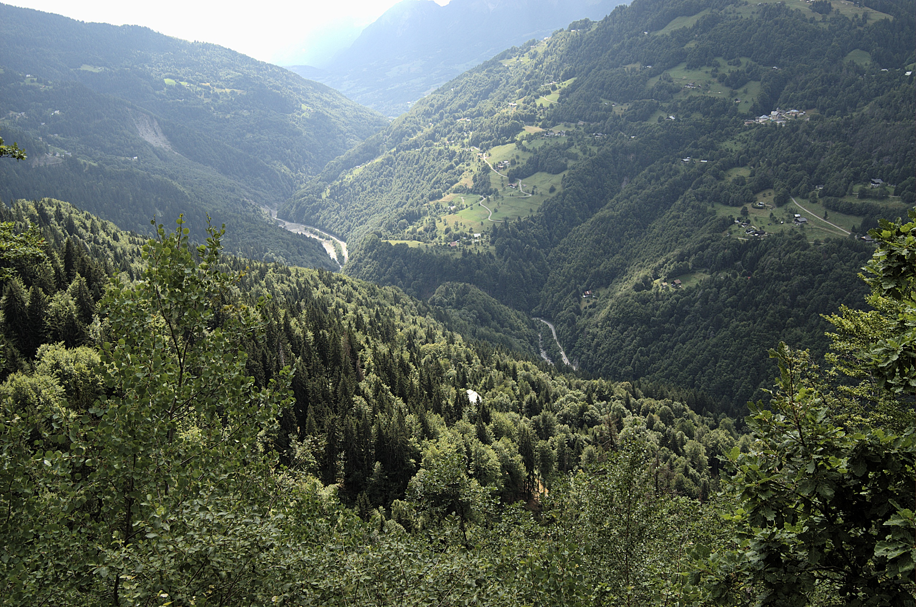 Une vue des basses Gorges de l'Arly depuis le Belvedère situé entre les hameaux du Cernix et des Panissats, sur la commune de Cohennoz. À l'extrême droite, le hameau d'Héry-sur-Ugine, à l'extrême gauche, lui faisant face, le chef-lieu de Cohennoz.